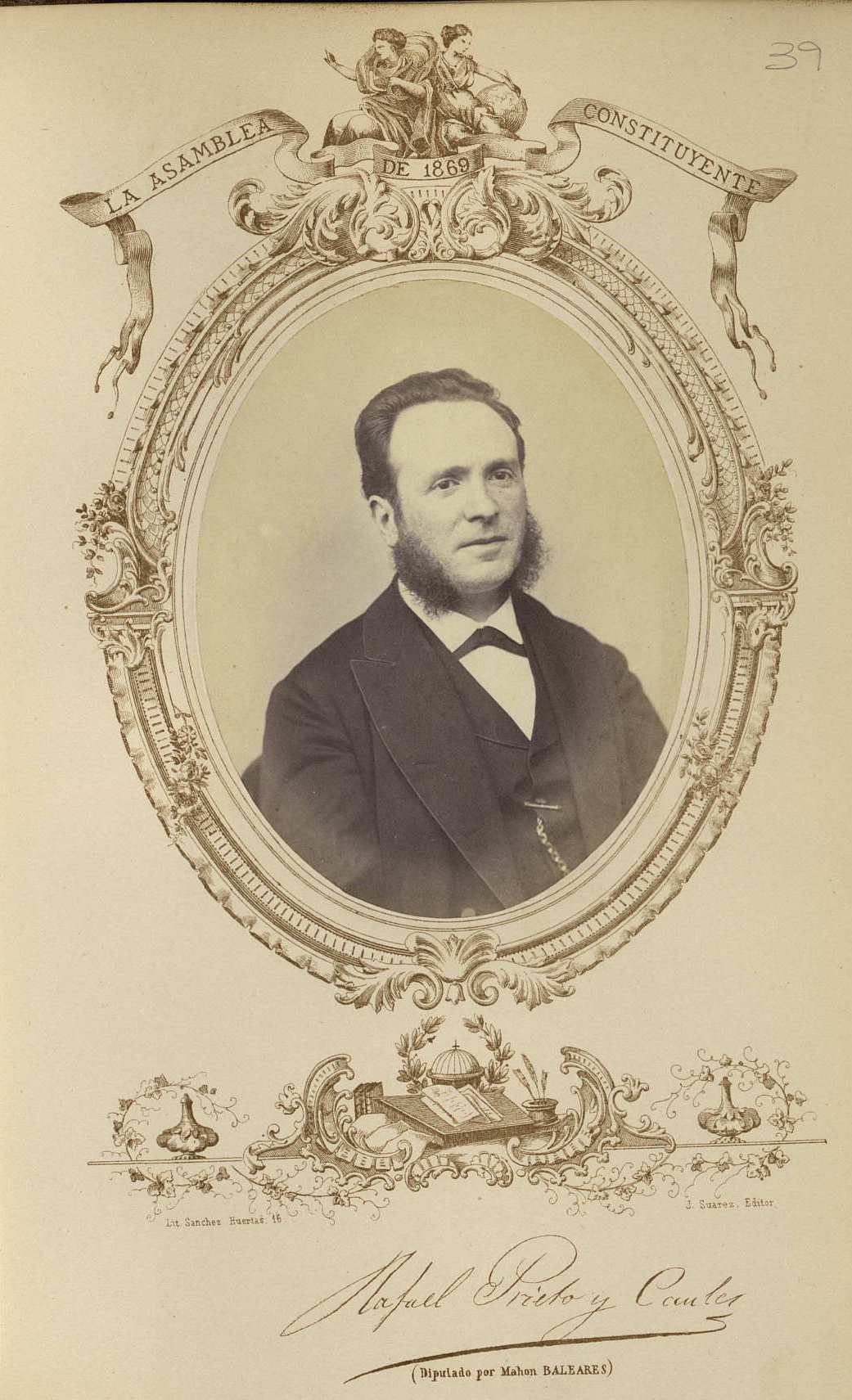 Rafael Prieto y Caules, José Suárez editor. La Asamblea constituyente de 1869. Facsímil de la firma e inscripción: (Diputado por Mahón BALEARES)